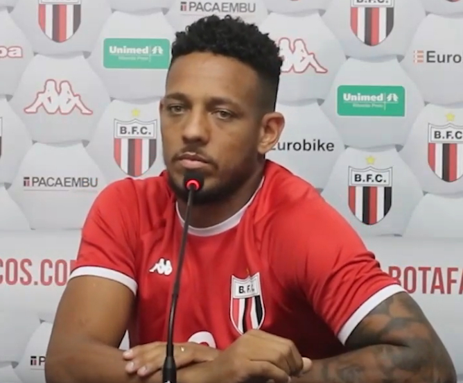 Wellington Tanque, atacante do Botafogo-SP, em coletiva de 2020